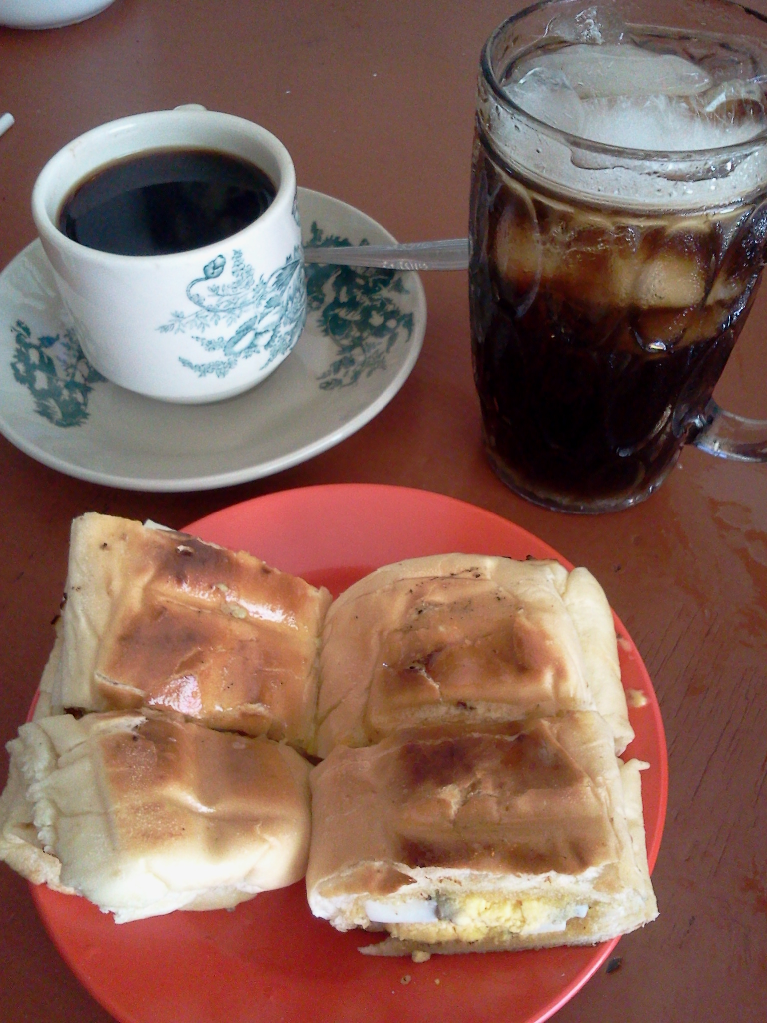 Kopi hitam, es kopi, dan roti telur panggang di Kopi Tung Tau.